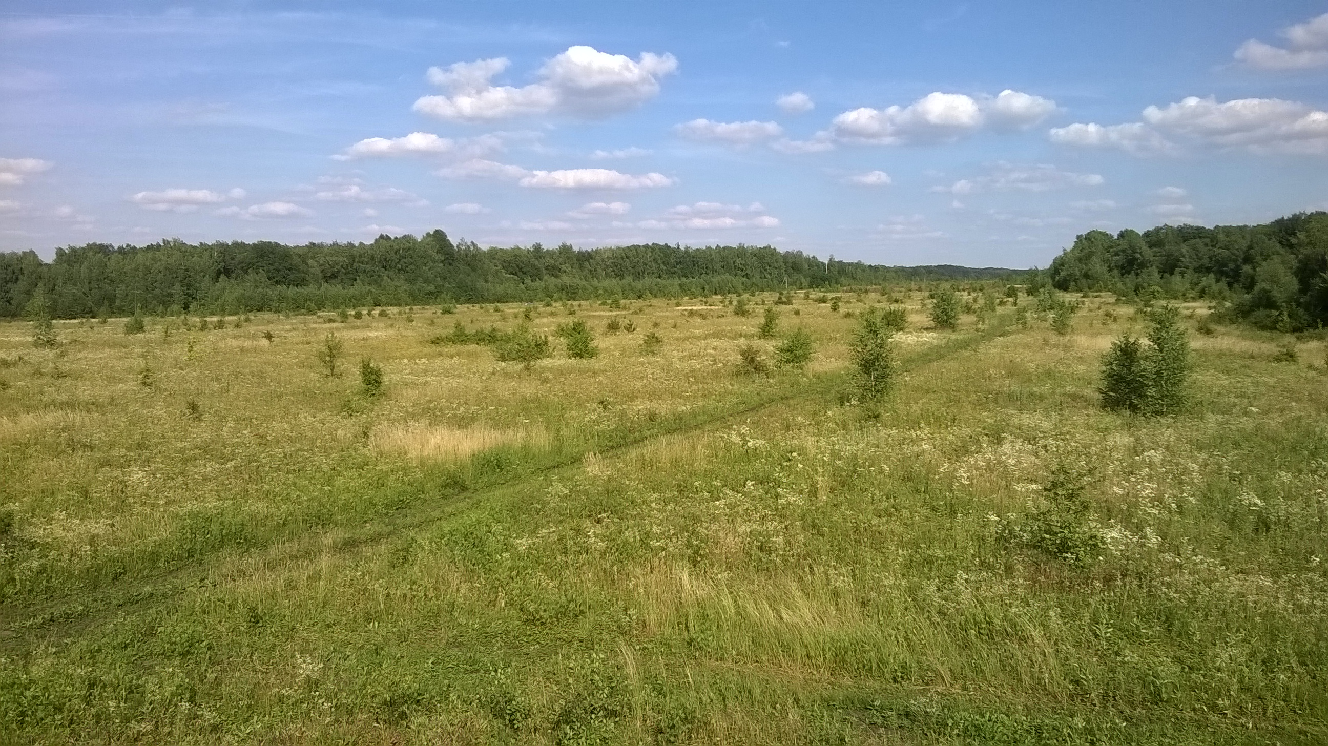 Жерновецкая дача, Золотухинский район This image is related to the protected area of Russia number 4610028